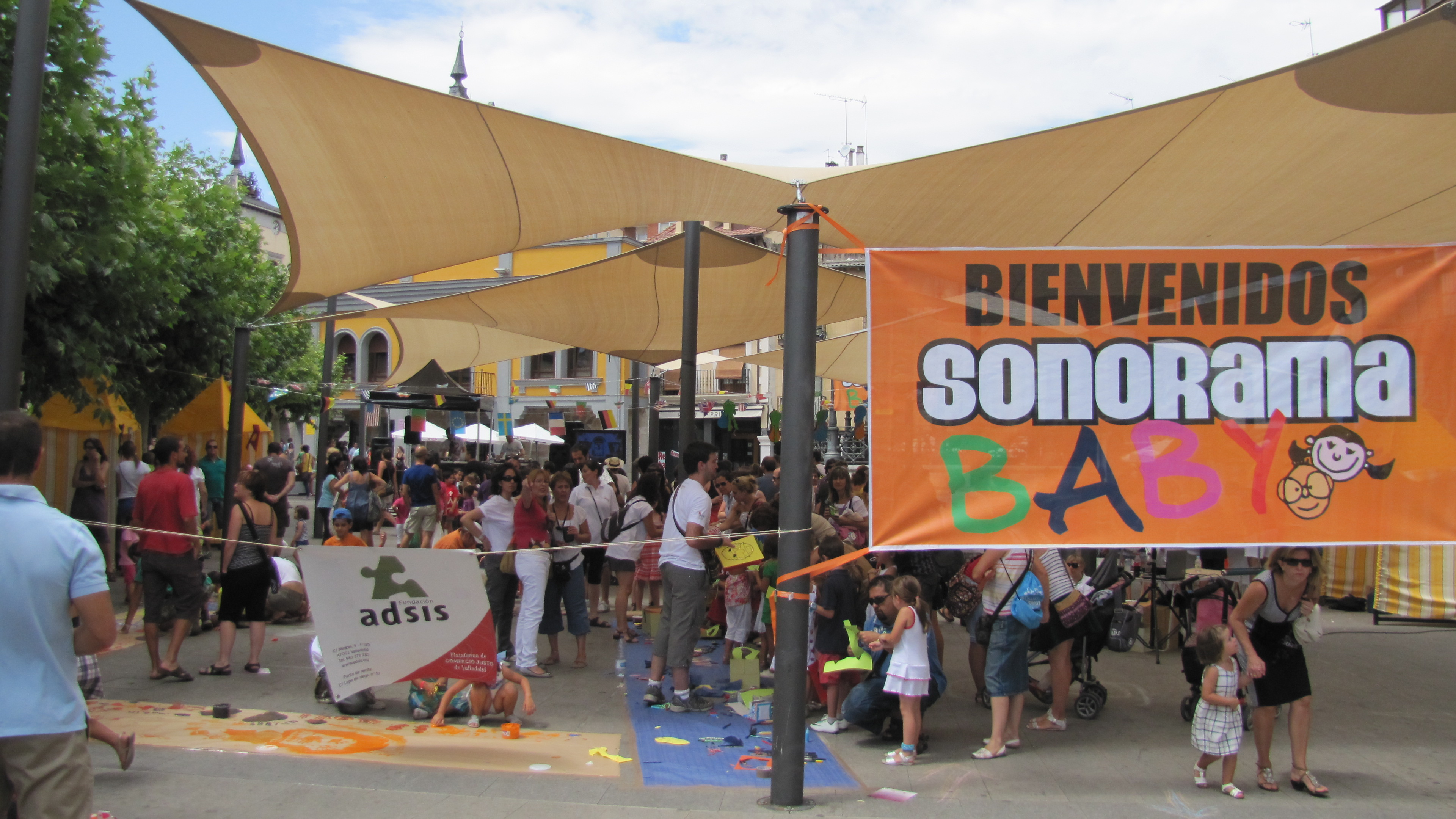 Foto tomada en la Plaza Mayor de Aranda de Duero (Burgos-España) durante el Festival Sonorama, lugar donde se desarrolló la actividad Sonorama Baby para niños.